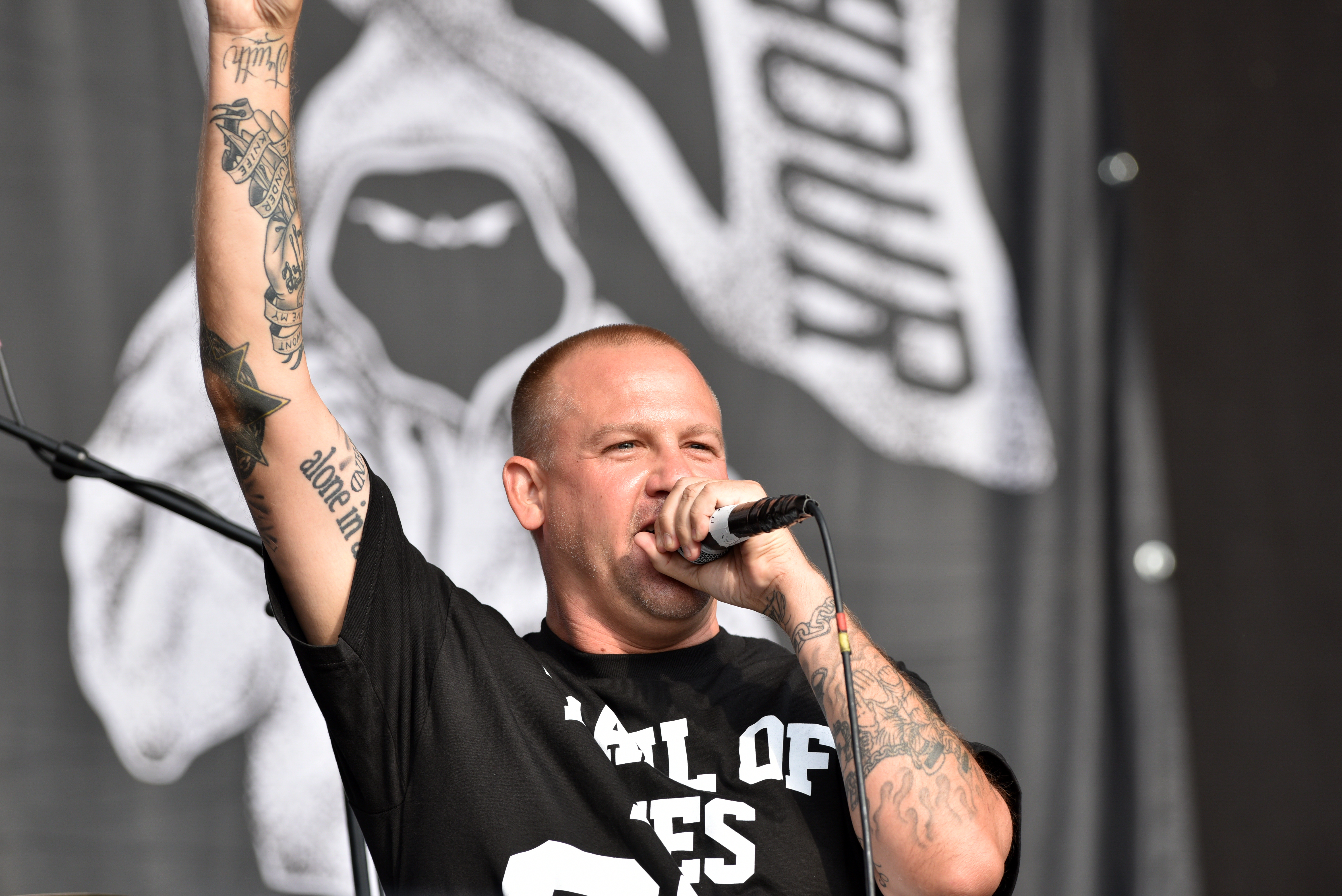 Terror auf dem Reload Festival 2017